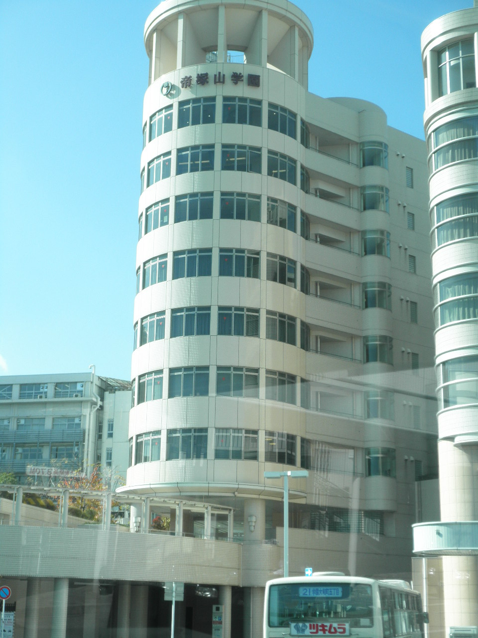 帝塚山大学学園前キャンパス16号館